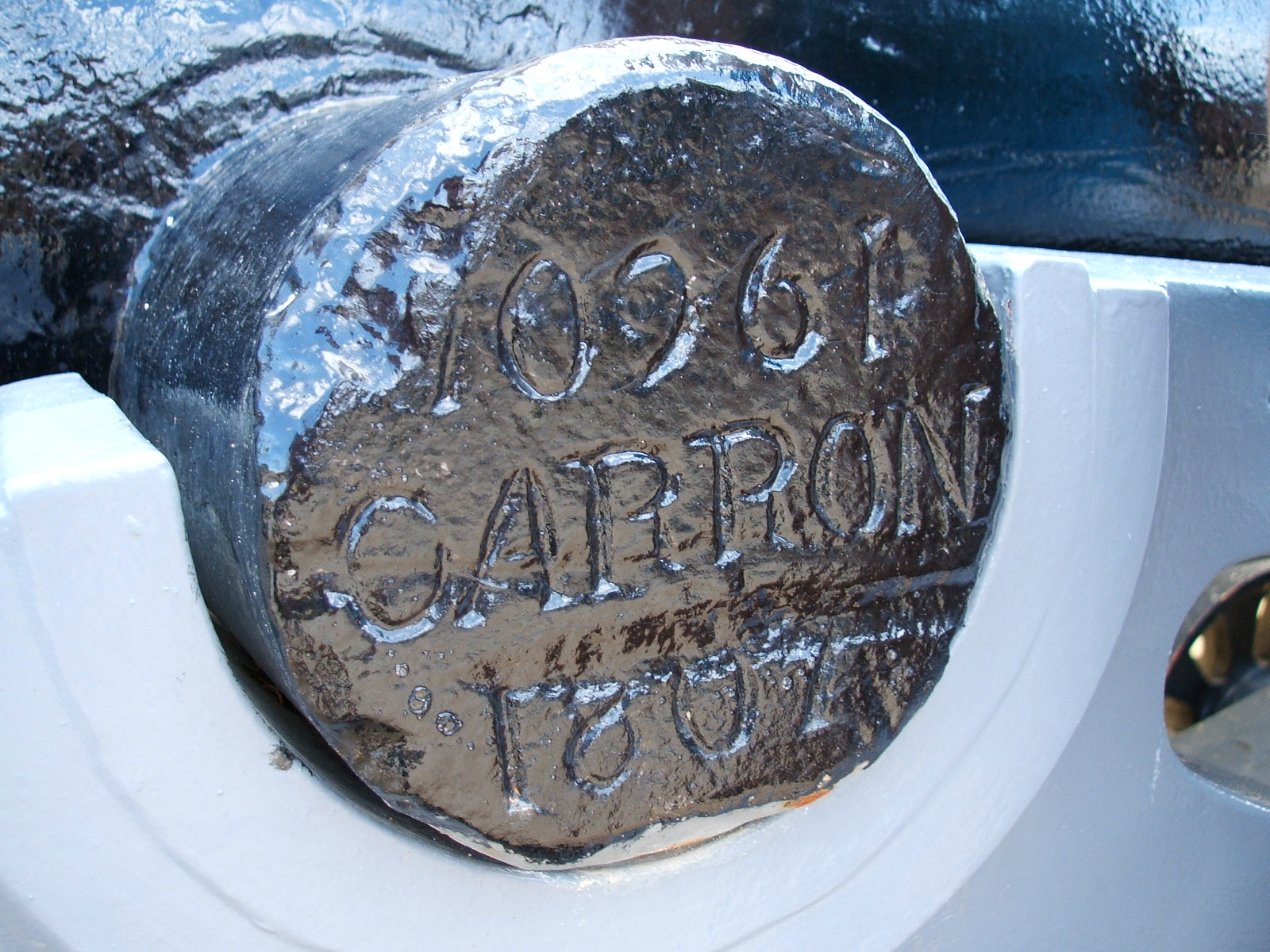 Das Bild zeigt die Herstellungsgravur einer Karronade auf der Insel Malta.